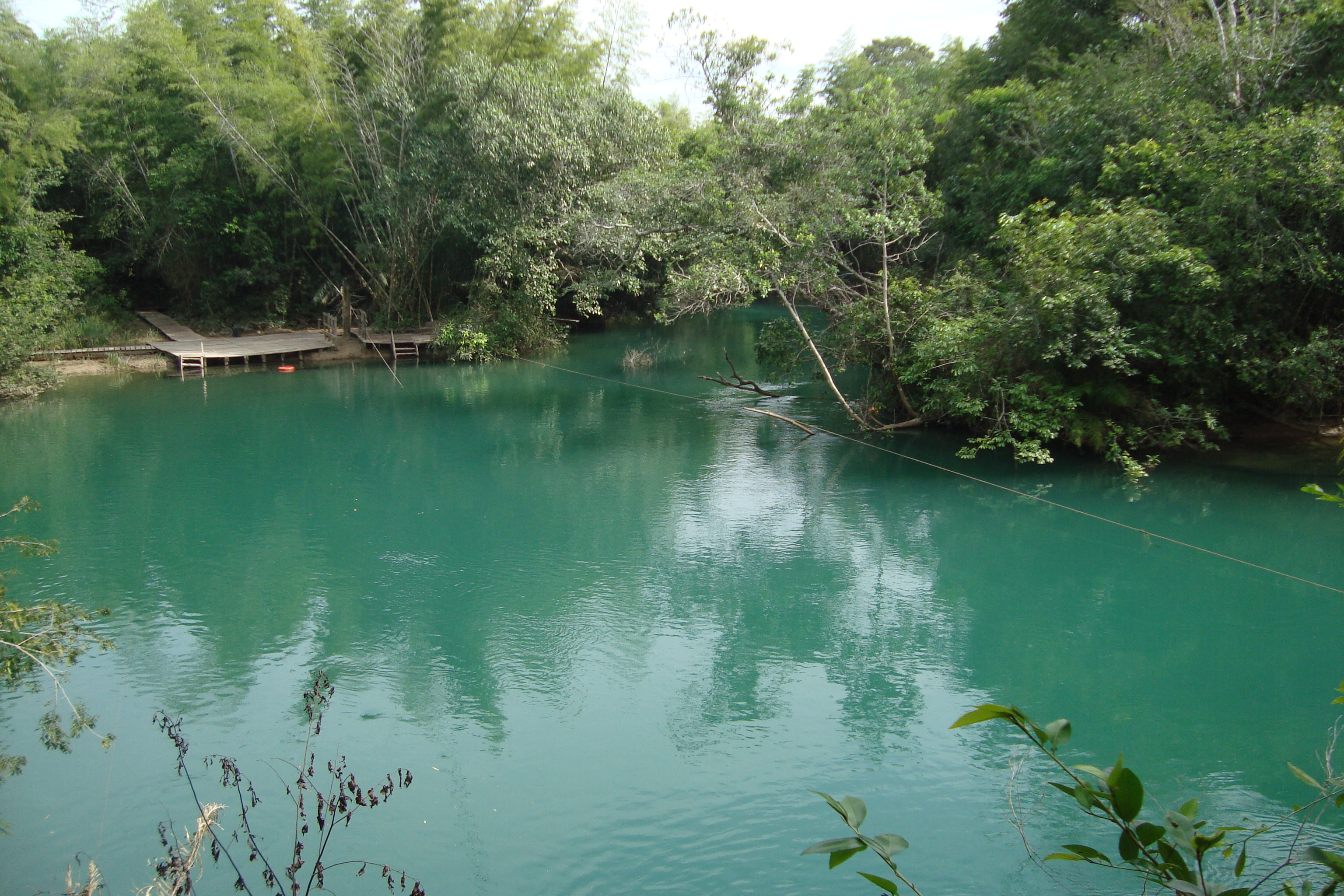 Rio da Prata no município de Jardim, Mato Grosso do Sul, Brasil